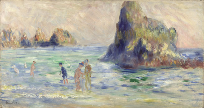 Pierre-Auguste Renoir: Moulin Huet Bay (Guernsey)